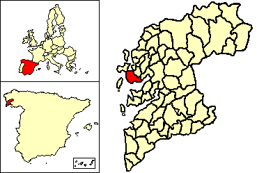 Municipio de Sanxenxo respecto a la provincia de Pontevedra (España)